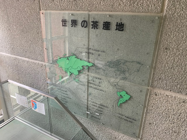 2019年8月18日、菊川文庫南出入り口側階段にて撮影